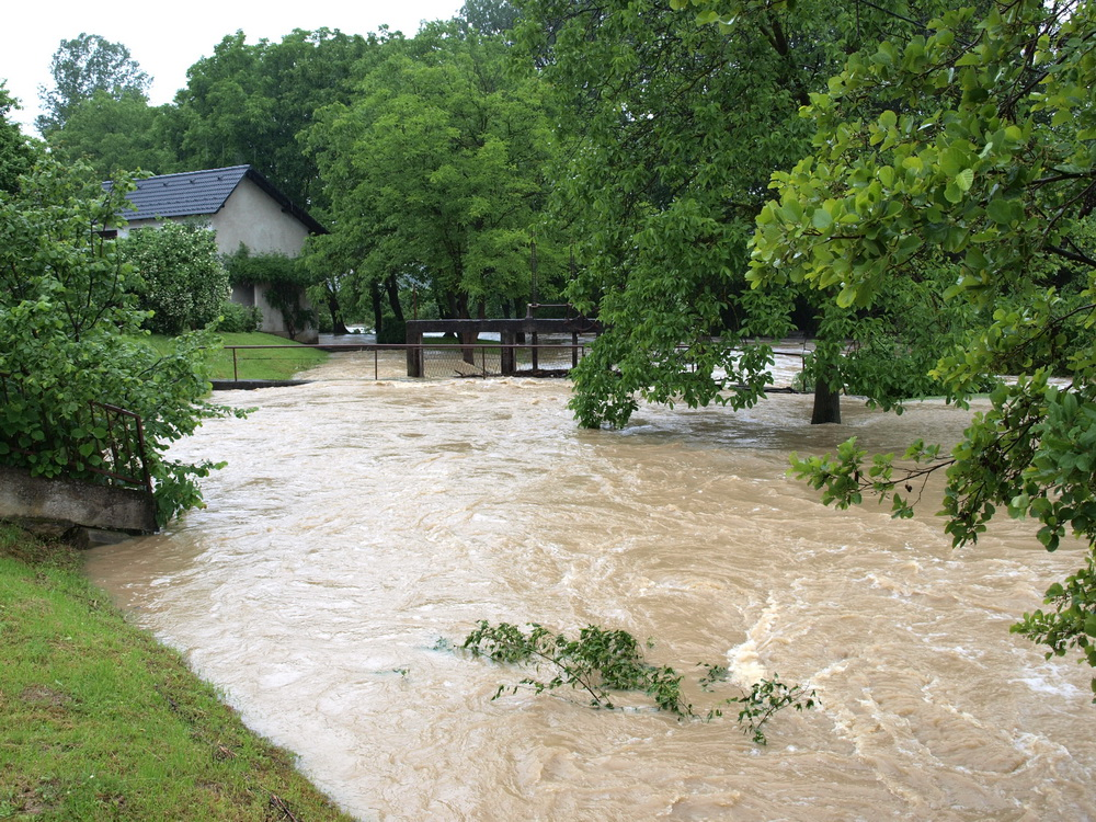 Naselje Tomica. Visok vodostaj riječice Glogovica.